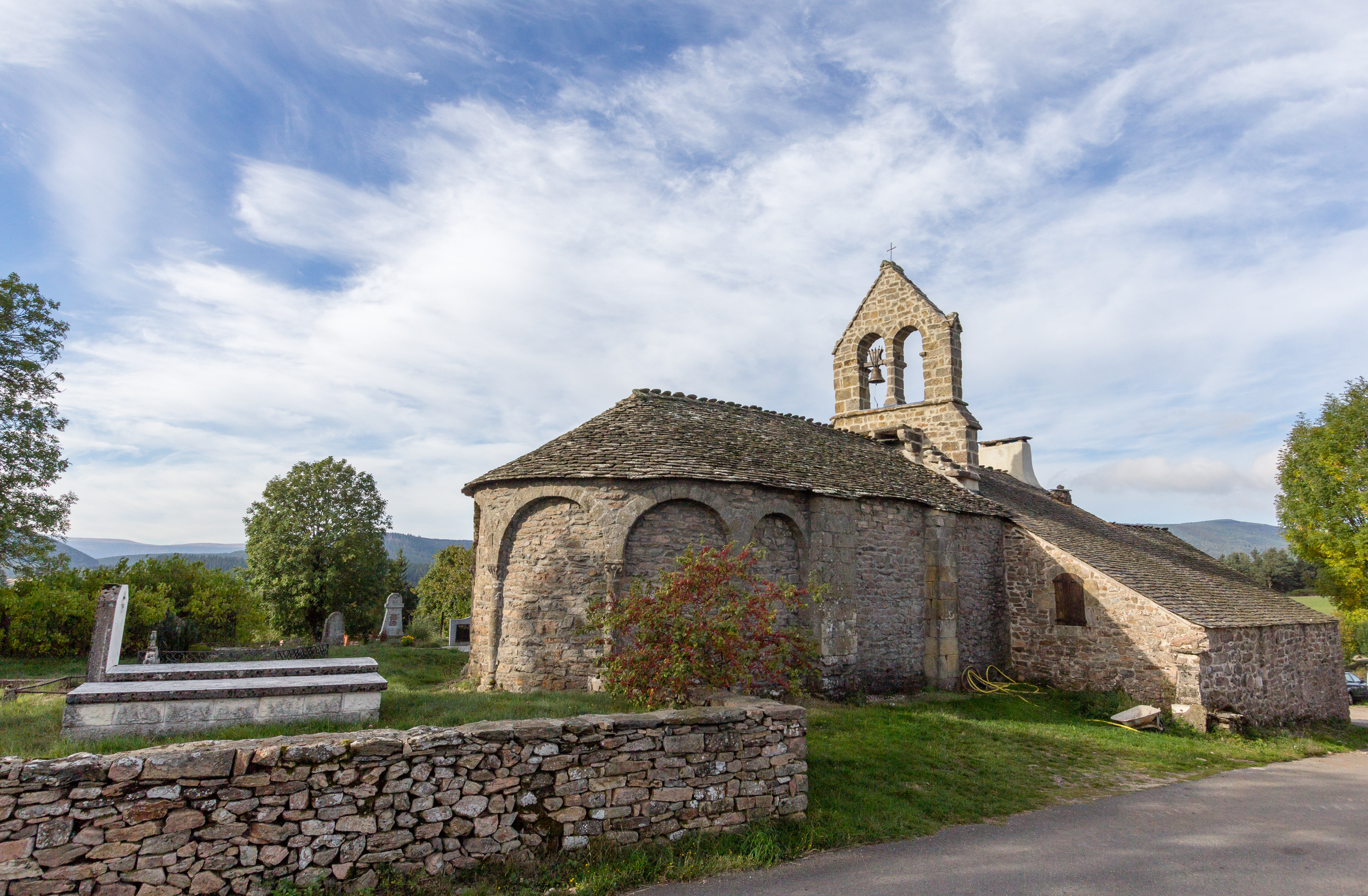 Église Saint-Laurent de La Bastide-Puylaurent (France).